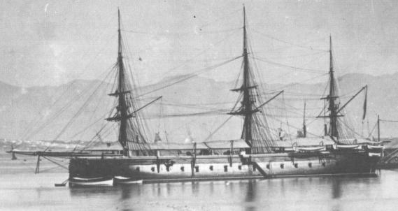 Fragata blindada Arapiles